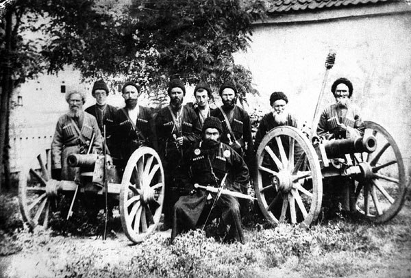 Нохчийн: наибаш